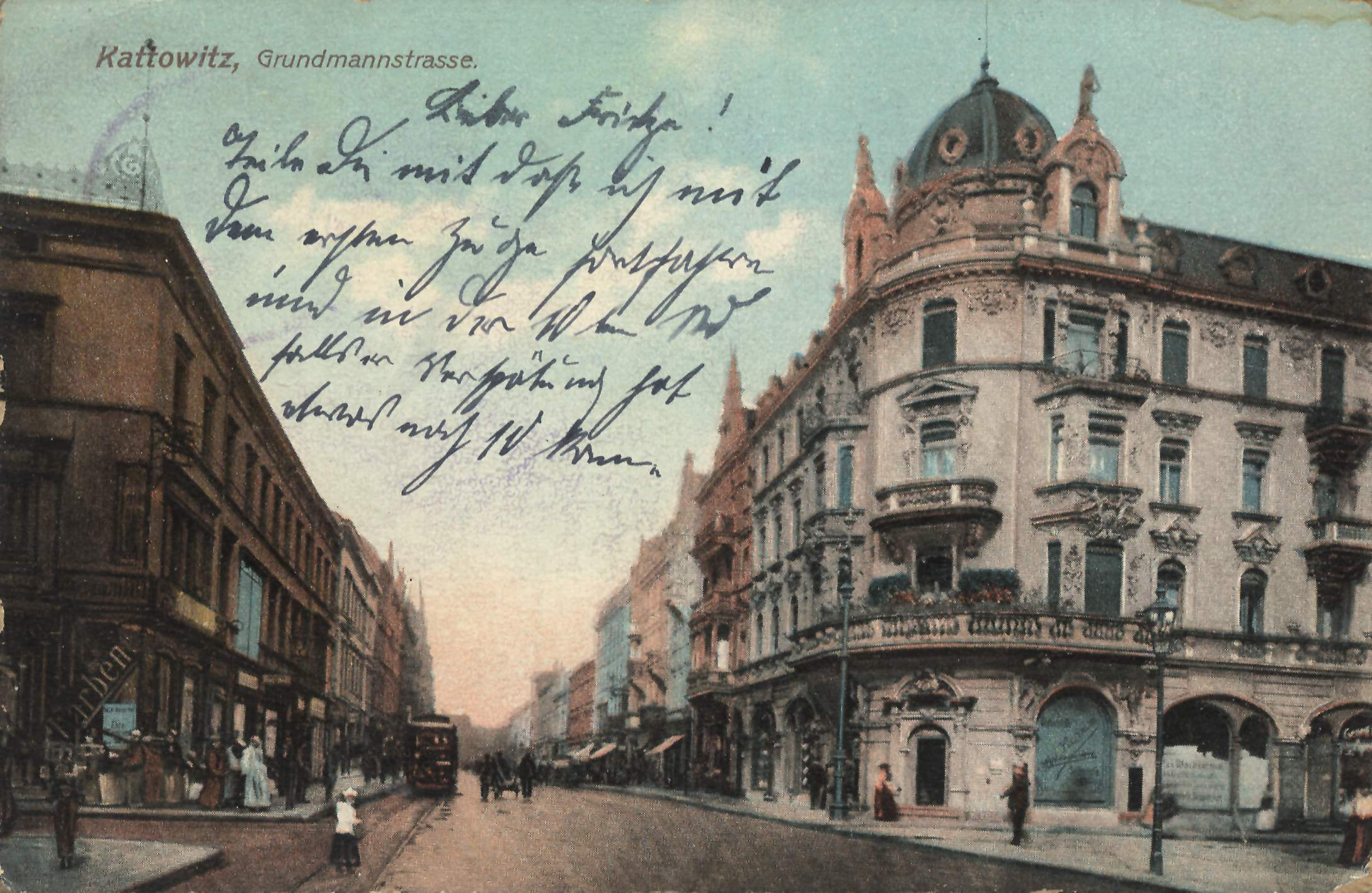 Ulica 3 Maja (ehemals Grundmannstraße, Industriestraße) in Kattowitz